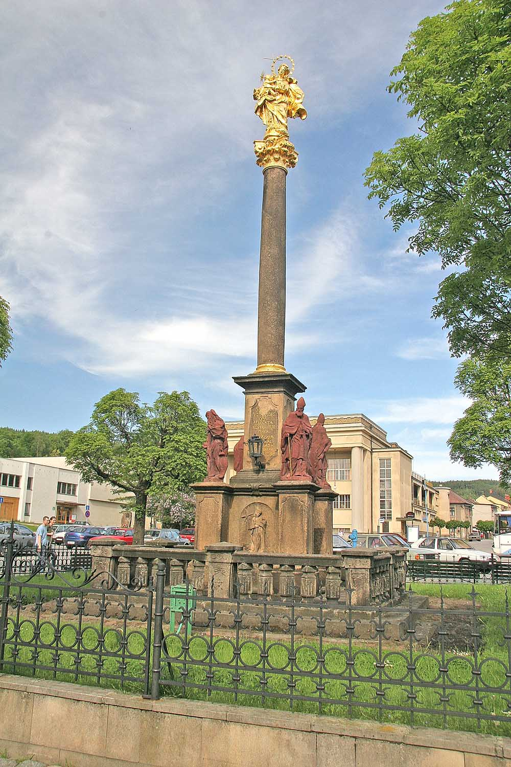 Morový mariánský slup na náměstí v Hronově z roku 1725. Obklopen sochami sv. Václava, Zikmunda, Prokopa a Vojtěcha, na podstavci reliéfy sv. Josefa, Petra, Jana Křtitele a Marí Magdaleny. autor: Prazak date: 9. 2006